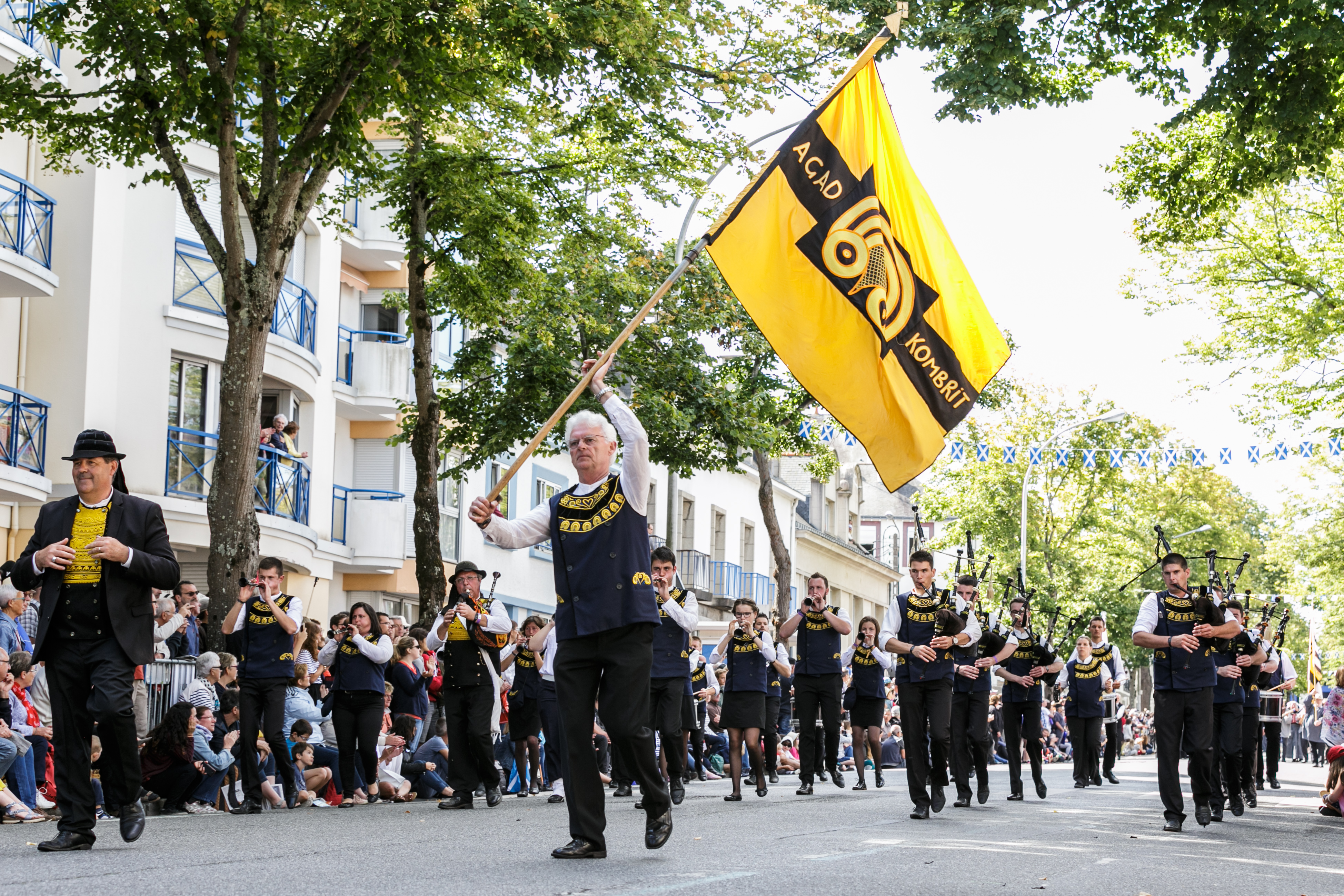 Festival Interceltique de Lorient 2017 - Grande parade des nations celtes - Bagad Kombrid (Combrit)